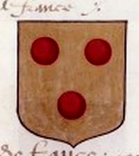 Armes de Pierre deCourtenay